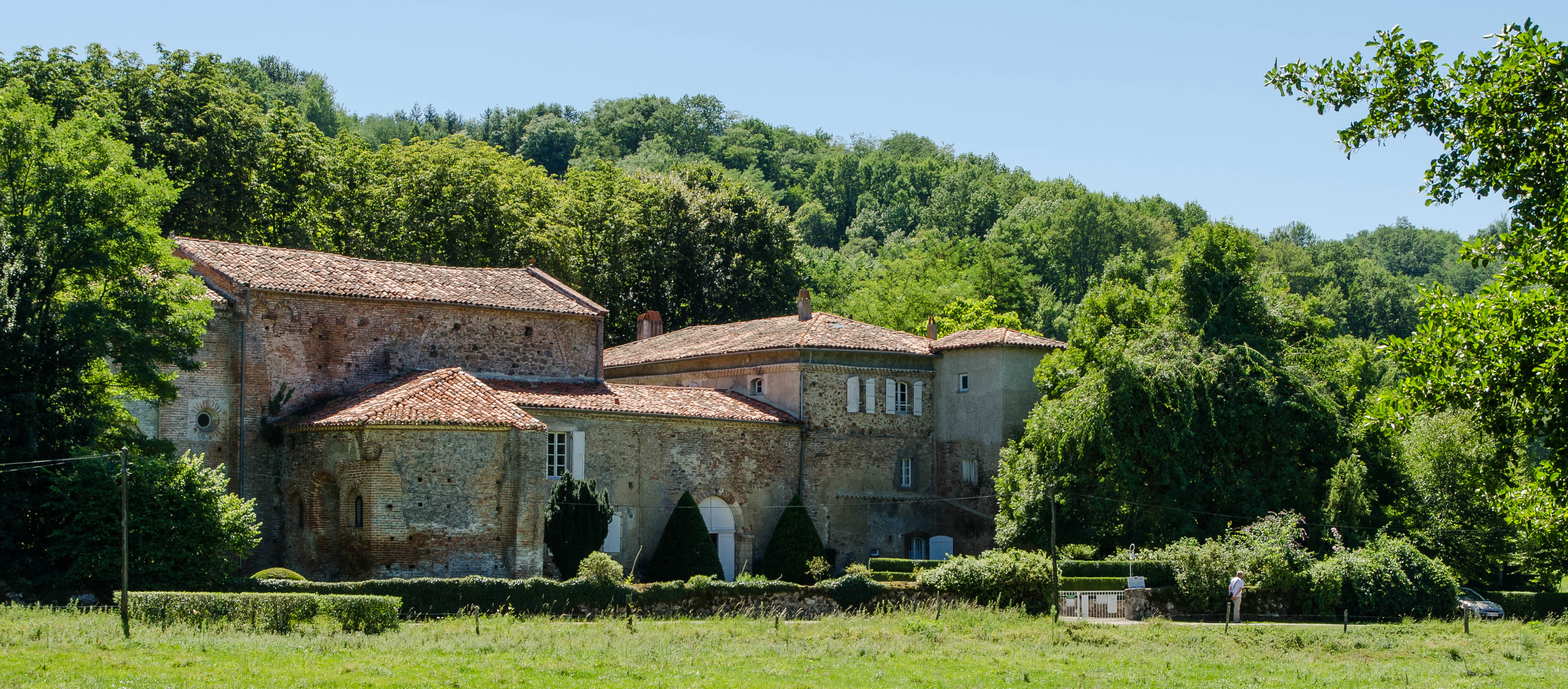 Abbaye de Combelongue sur la commune de Rimont en Ariège (09)